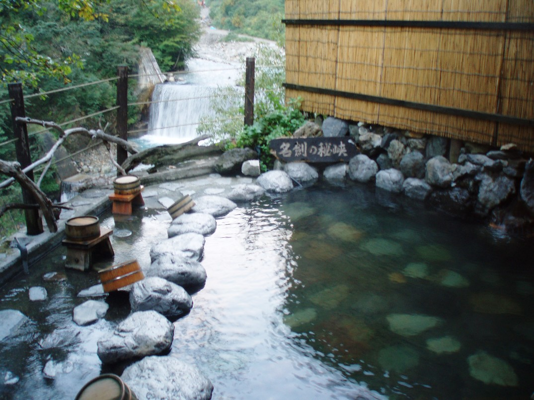 富山県黒部峡谷温泉郷、名剣温泉露天風呂。